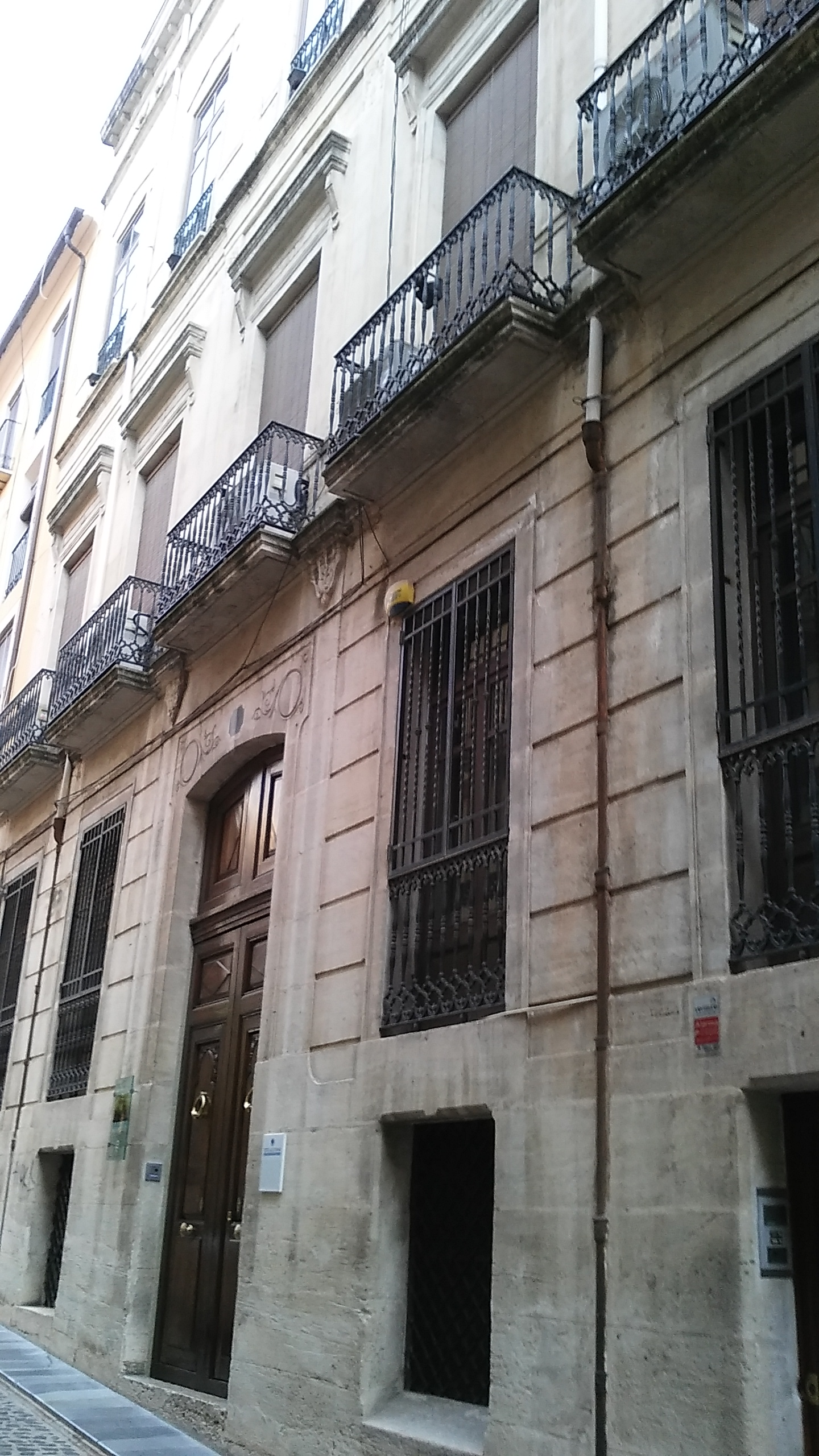 Real Fábrica de Paños de Alcoy, en Alcoy (Alacant).